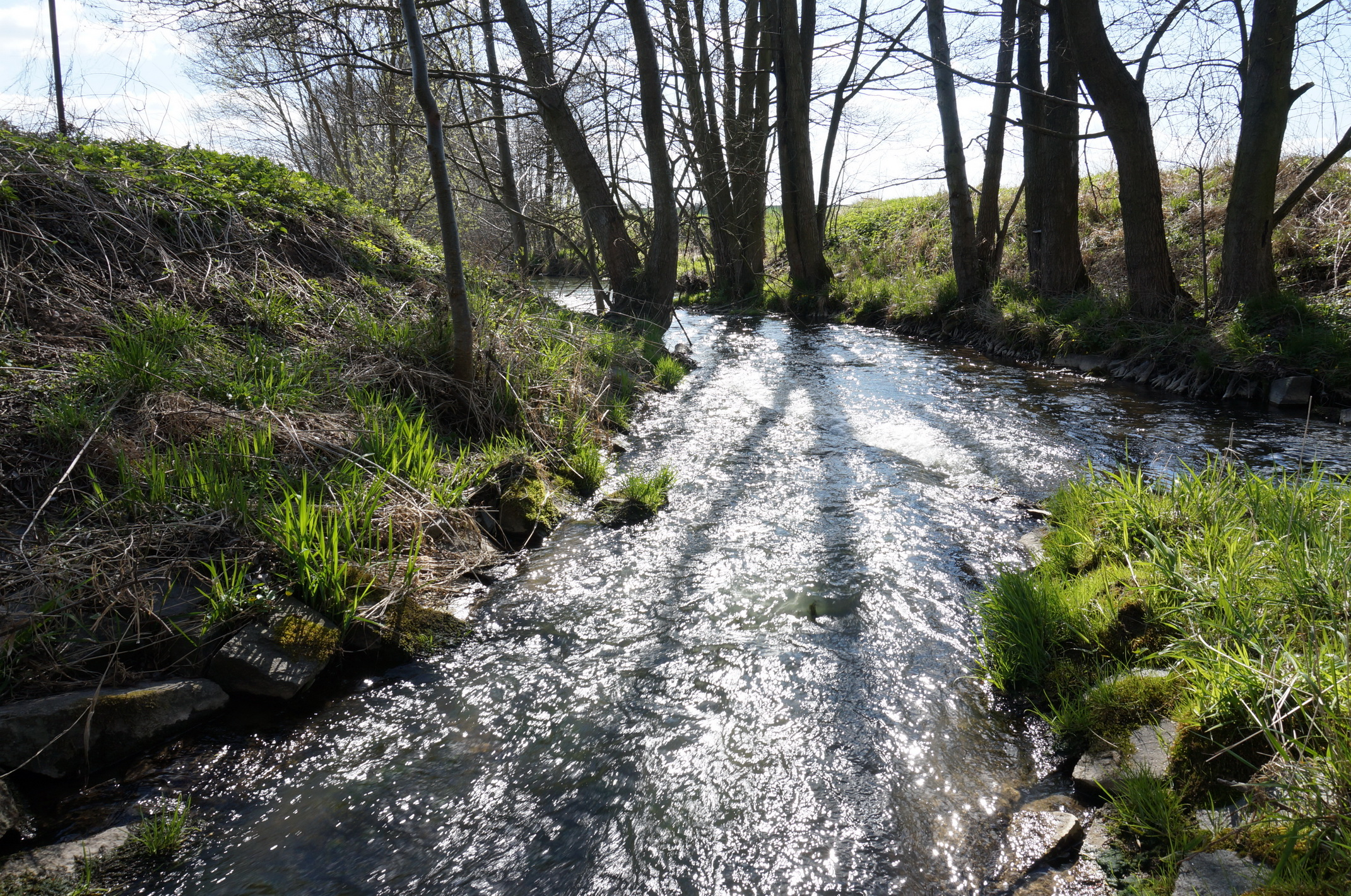 Soutok Hustiranka a Trotina (vpravo)